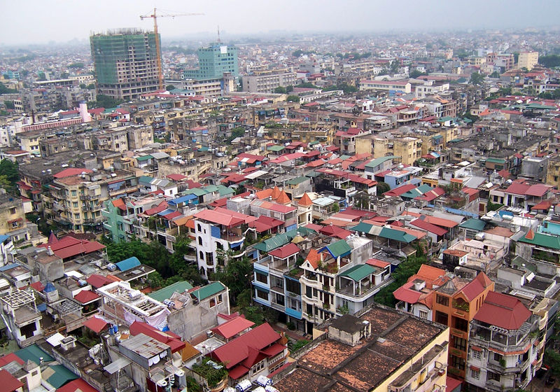 Blick auf Hanoi